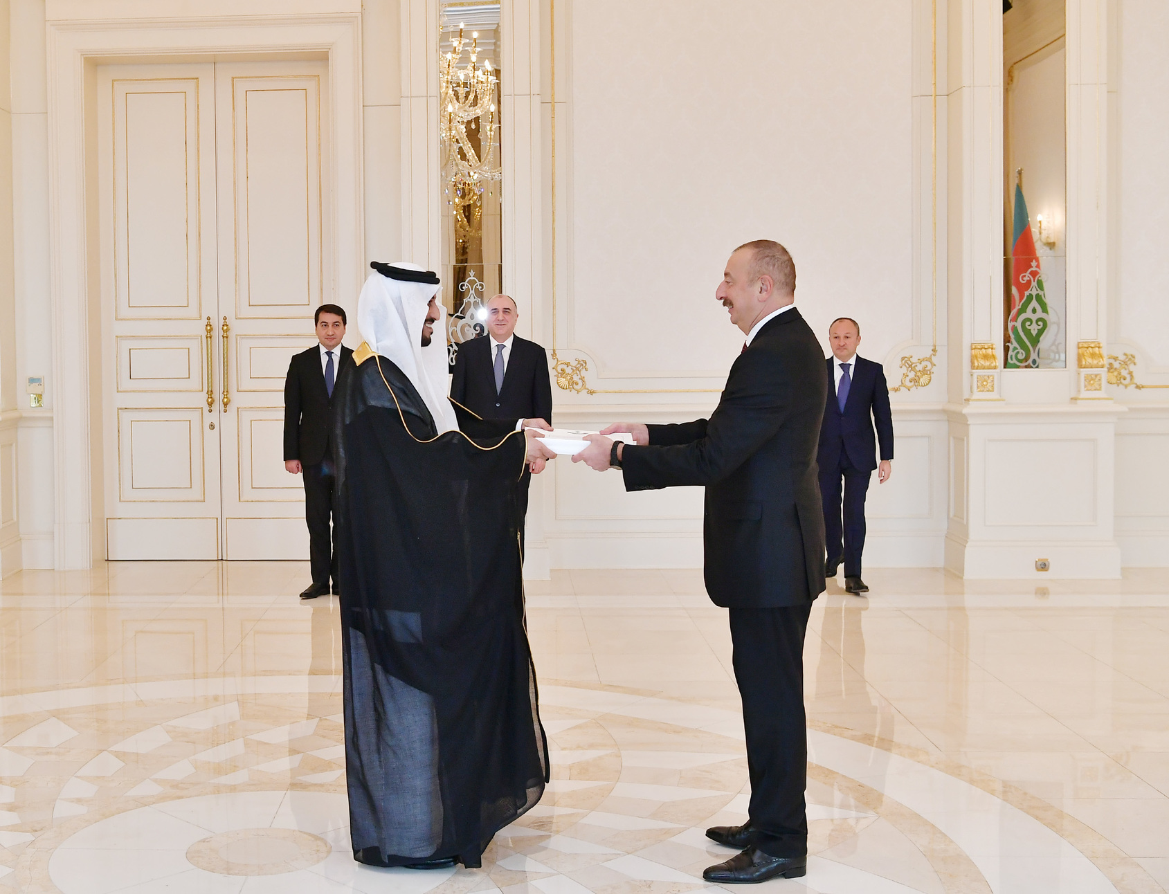 İlham Əliyev Səudiyyə Ərəbistanının Azərbaycana təyin olunmuş səfirinin etimadnaməsini qəbul edərkən